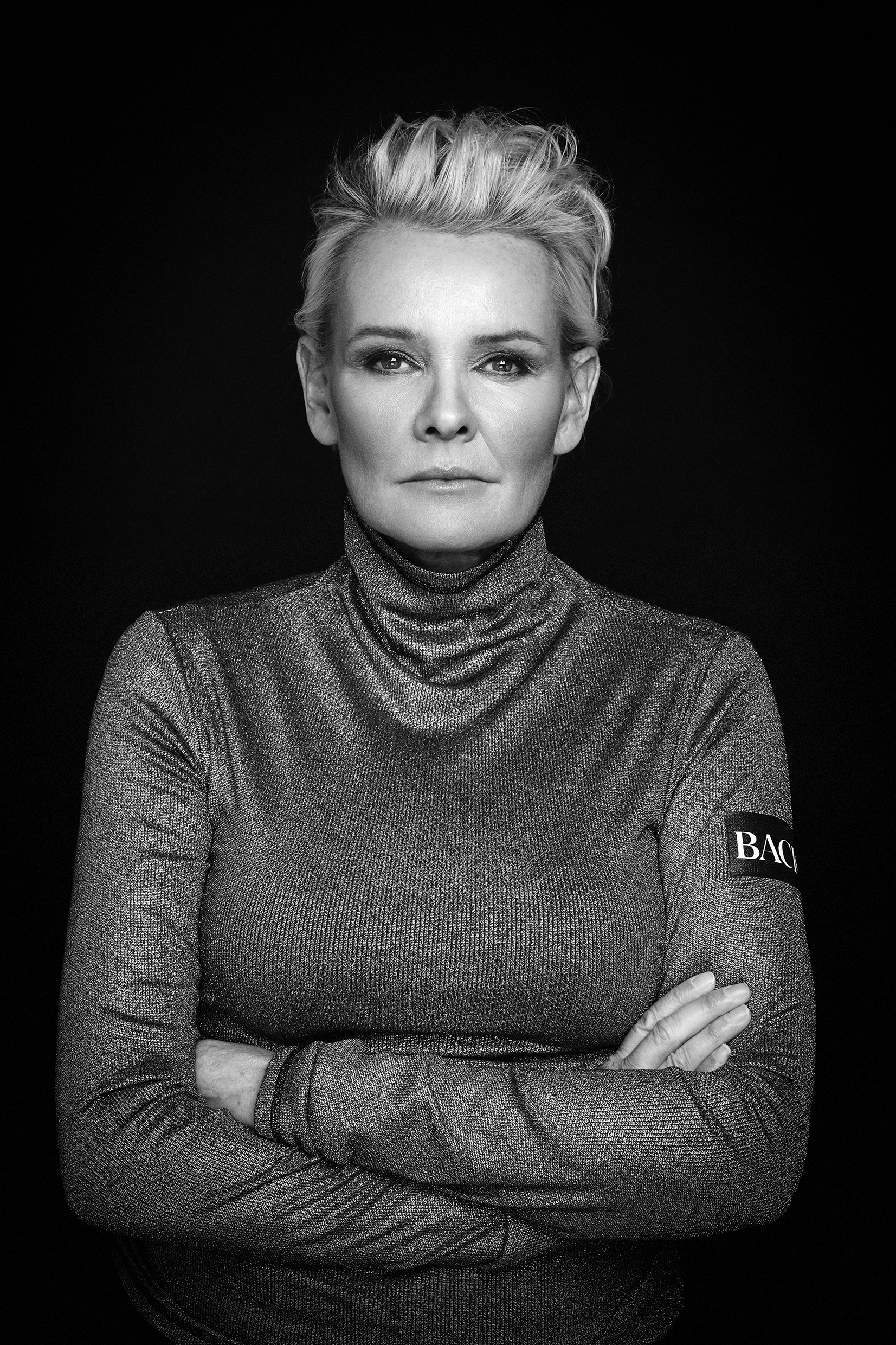 Artisten Eva Dahlgren.